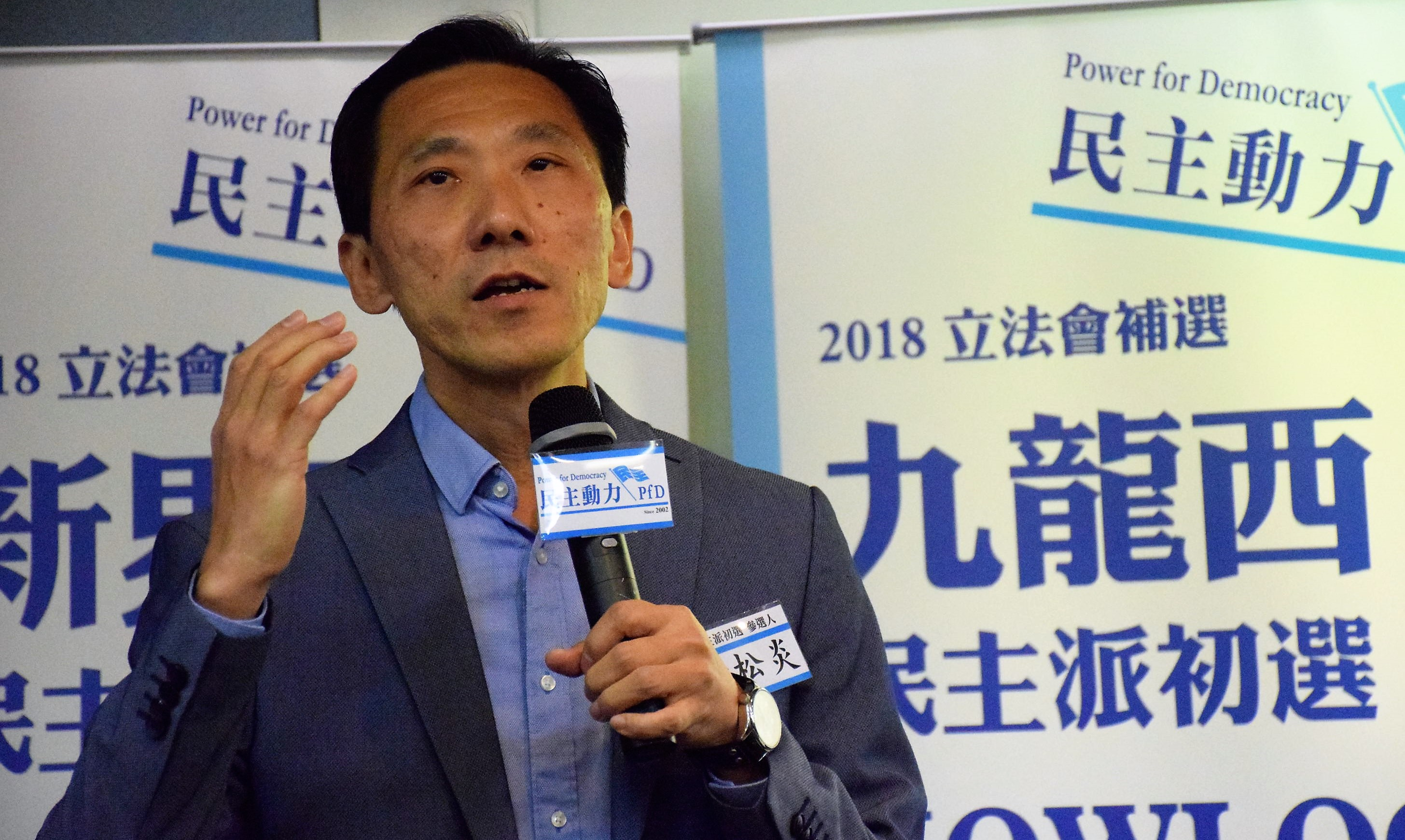 被取消立法會議員資格的姚松炎。